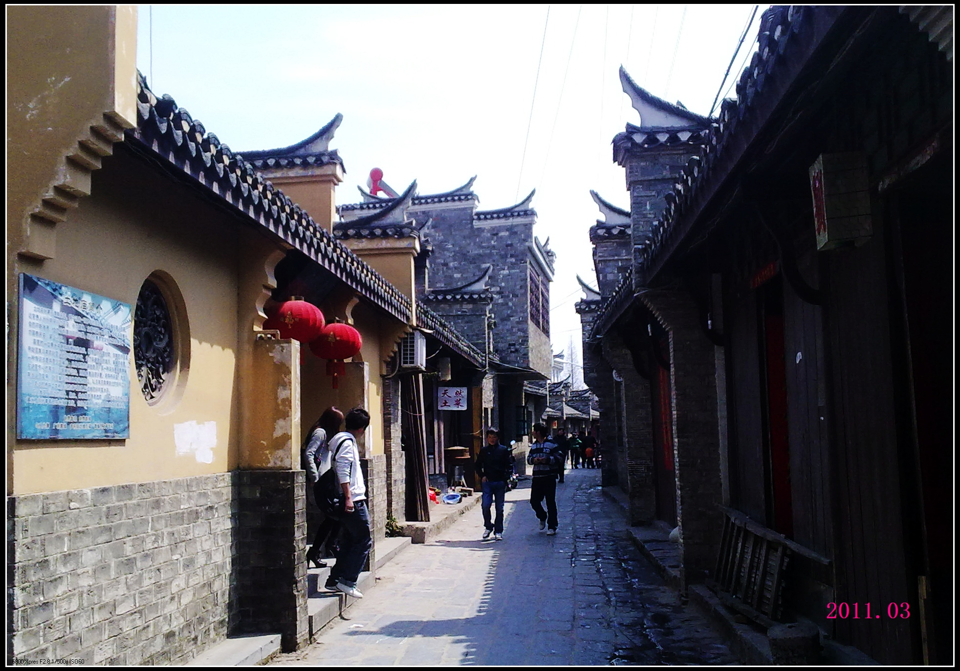 三河古镇小巷